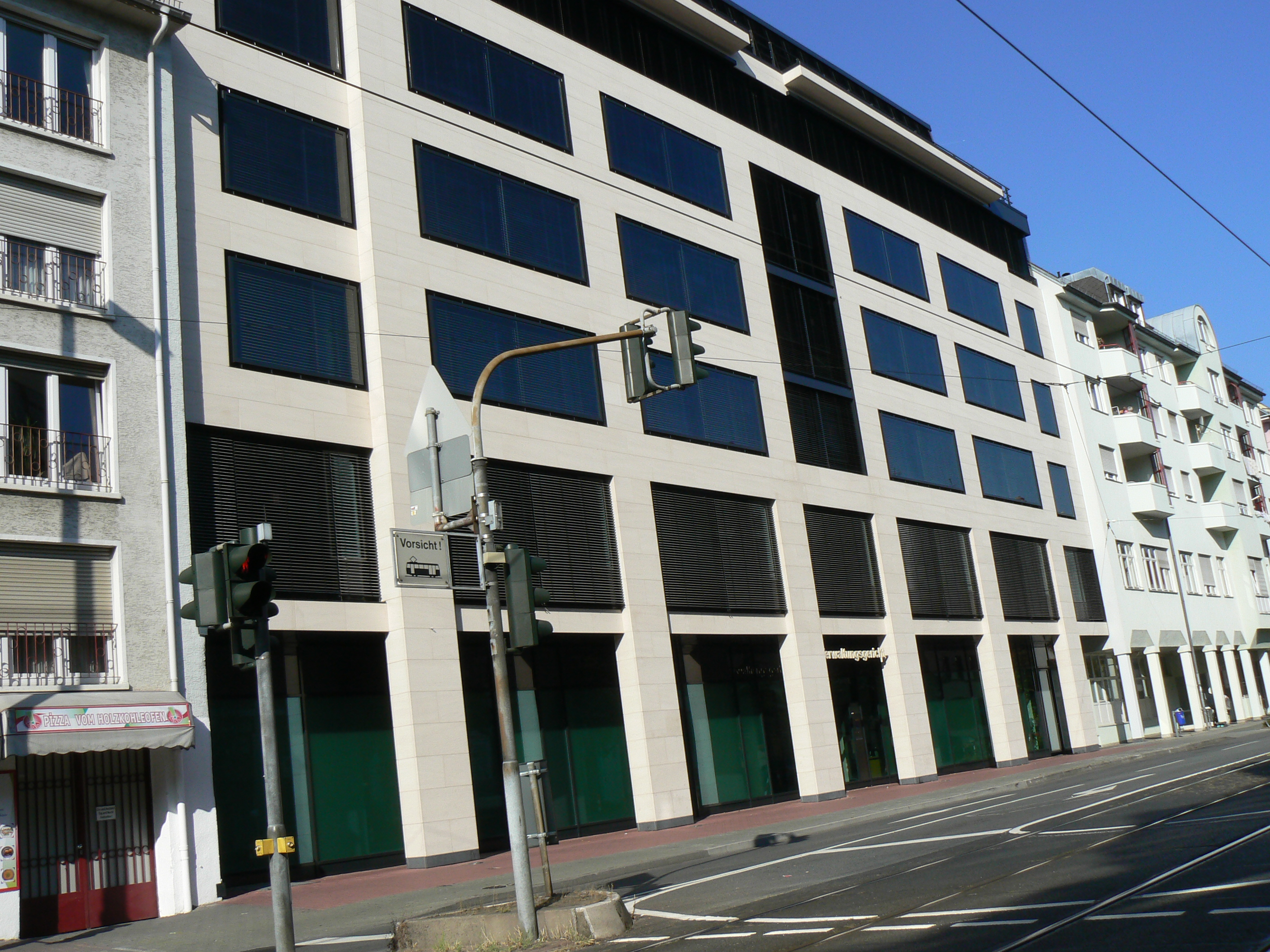 Verwaltungsgericht Frankfurt am Main, Adalbertstraße 18; Neubau 2006. Vor Zerstörung während des 2. Weltkrieges stand hier das 1839 gebaute Hotel RHEINGAUER HOF noch in der damaligen Straße SCHÖNE AUSSICHT. Es hatte einen eigenen Ball/Theatersaal. In ADALBERTSTRASSE wurde sie erst 1895 nach Eingemeindung Bockenheims umbenannt. 1943 hatte die benachbarte Hartmann & Braun AG, die elektrische und wärmetechnische Meßgeräte herstellte, in diesem Hotel "Rheingauer Hof" ein Lager für sowjetische Zwangsarbeiterinnen eingerichtet. Die Firma war ein wichtiger Zulieferer für die Flugzeugindustrie und betrieb mehrere Lager in Frankfurt.